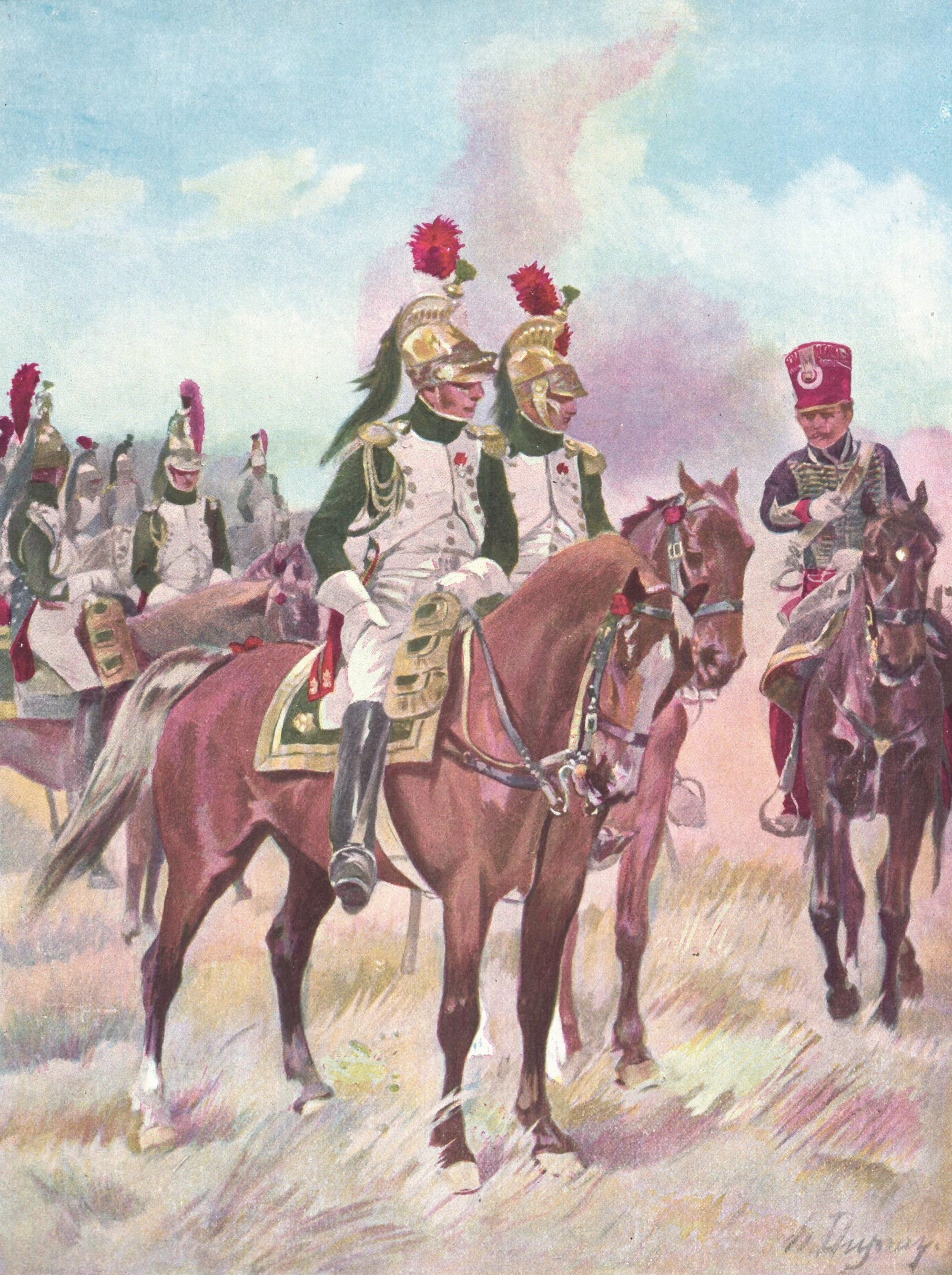 Dragons de la Garde impériale sur le champ de bataille. Les deux officiers, au premier plan, reçoivent les directives d'un aide de camp.